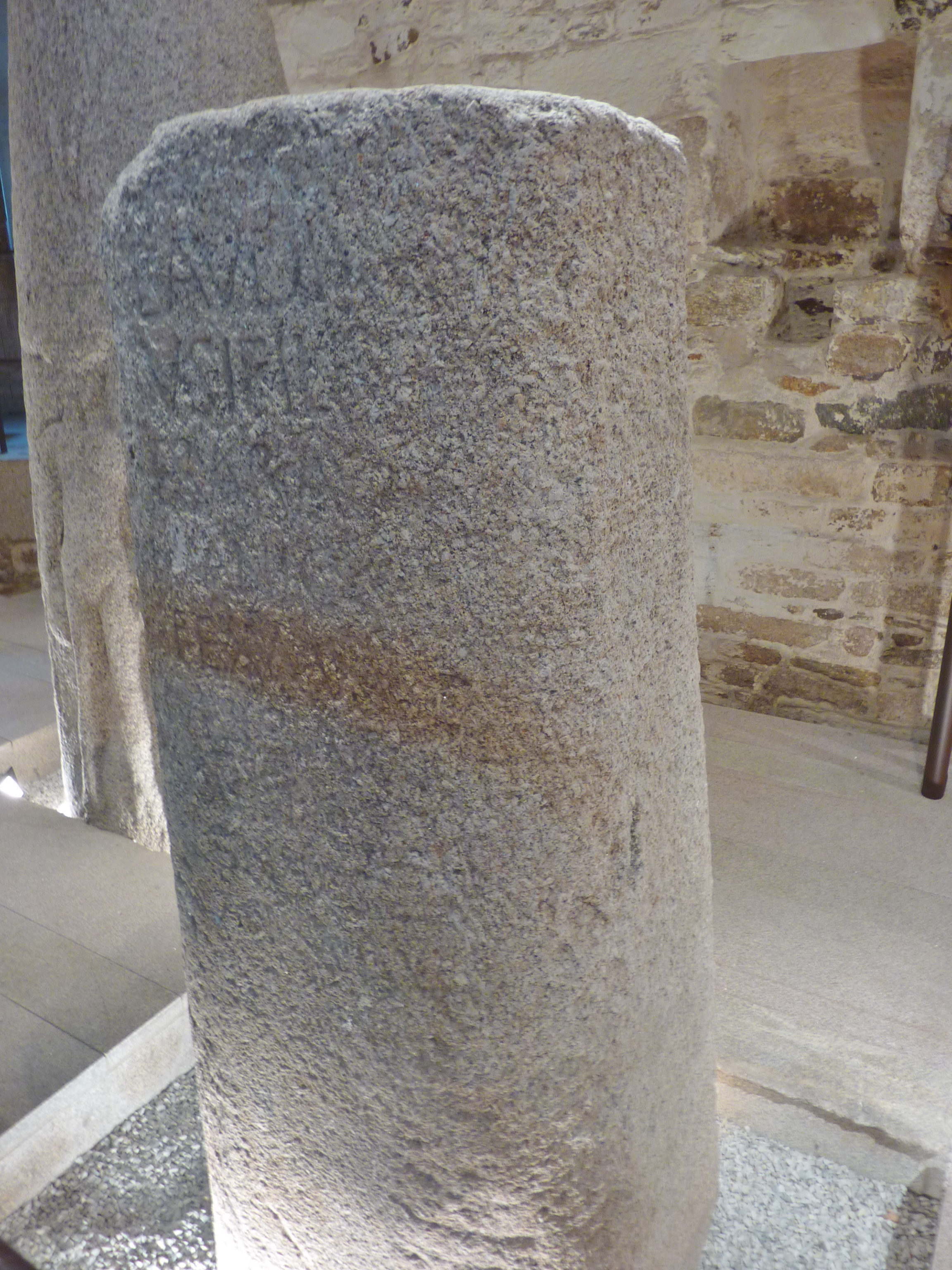 Kernilis : borne milliaire de Kerscao (Musée départemental breton de Quimper), en granite, datée de 45 ou 46 après JC. C'est la plus ancienne connue en Bretagne.